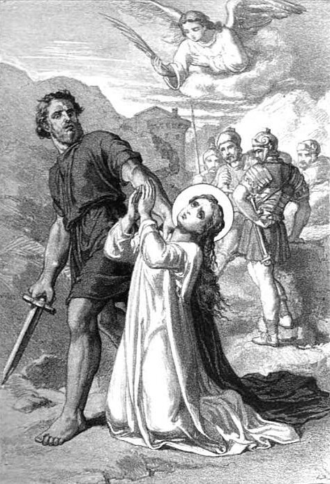 Santa Germana virgen y mártir. Litografía de Pedro Barcala Sánchez (siglo XIX)